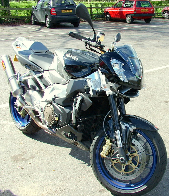 Aprilia Tuono 1000R